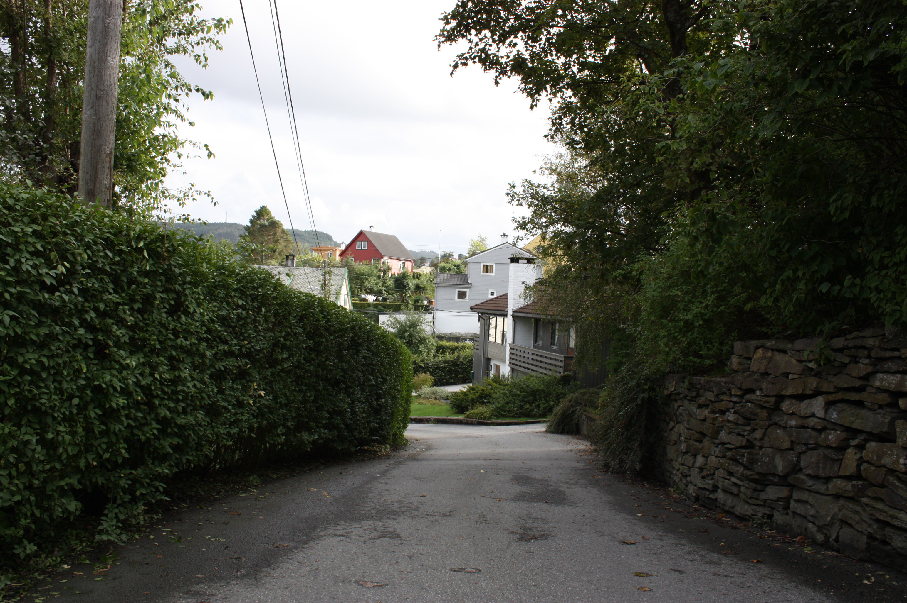 Iduns veg, Fana, Bergen.